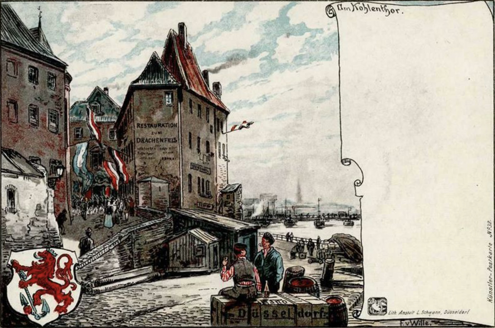 Am Kohlentor, Fritz von Wille (vor 1900), Künstler-Postkarte Litho L. Schwann, Düsseldorf An der Westseite der Krämerstraße, neben dem Kohlentor, stand das Haus Nr. 1 mit der Gastronomie „Zum Drachenfels“. Der Abriss fand zwischen 1898 und 1902 statt.